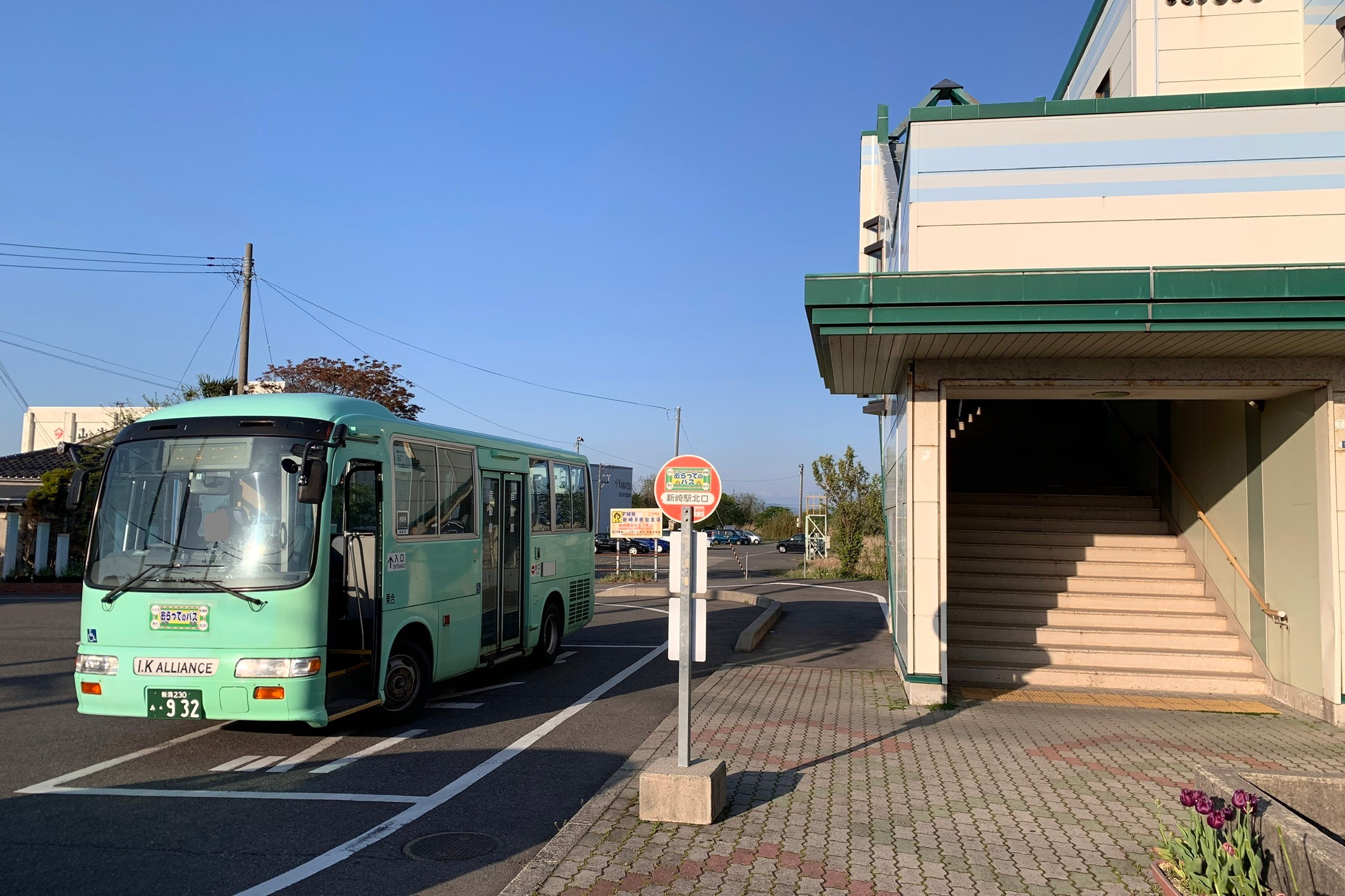 新崎駅に停車中のおらってのバス（2020年5月）